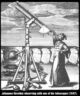 Galileu Galilei 1608-2008=400 anos do telescópio